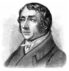 Barthold Georg Niebuhr aus: Meyers 6. Auflage